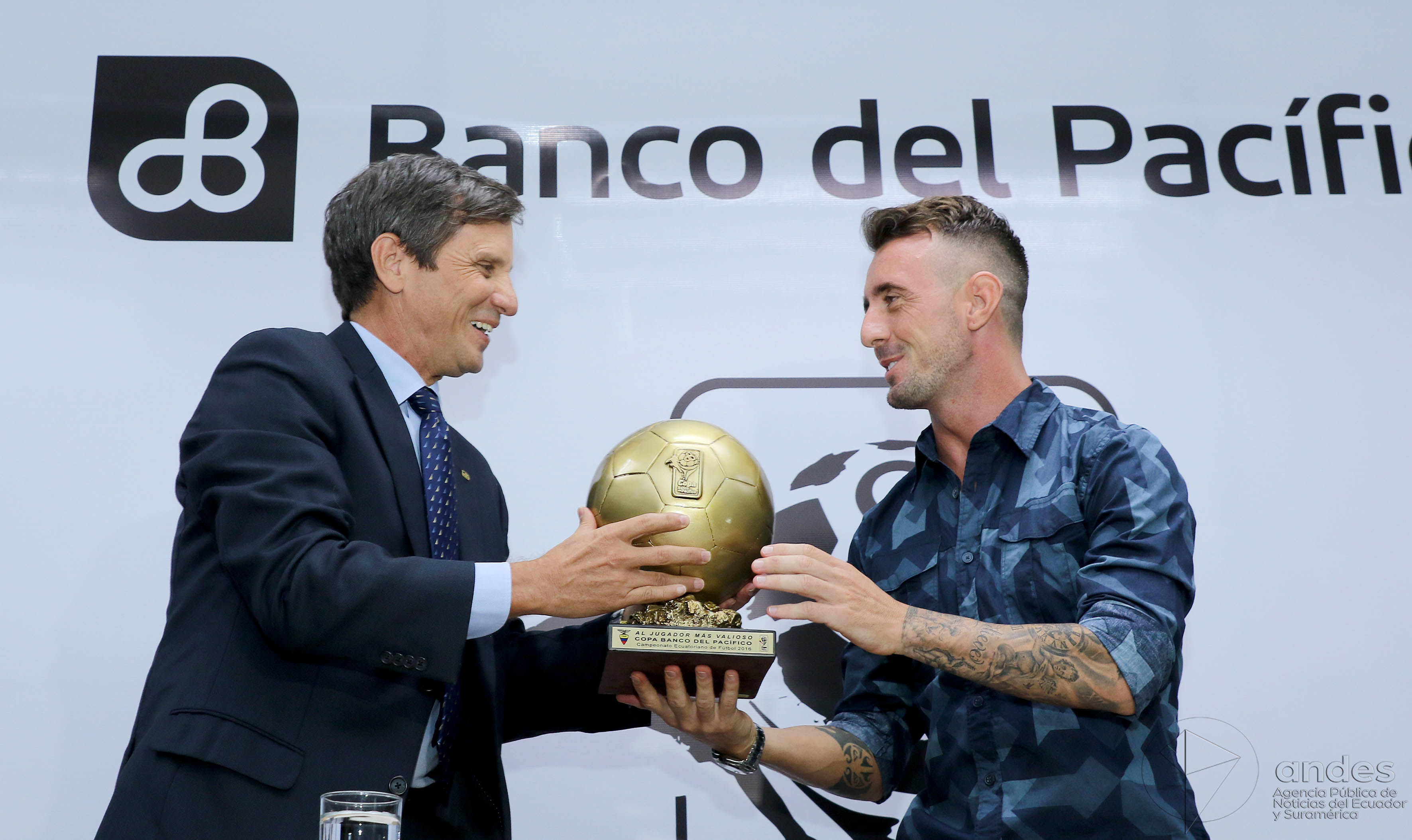 Guayaquil, jueves 05 de enero del 2017 (Andes).-Banco del Pacífico premió a Damián Díaz, elegido como mejor jugador del campeonato ecuatoriano del 2016. Foto:Andes/César Muñoz